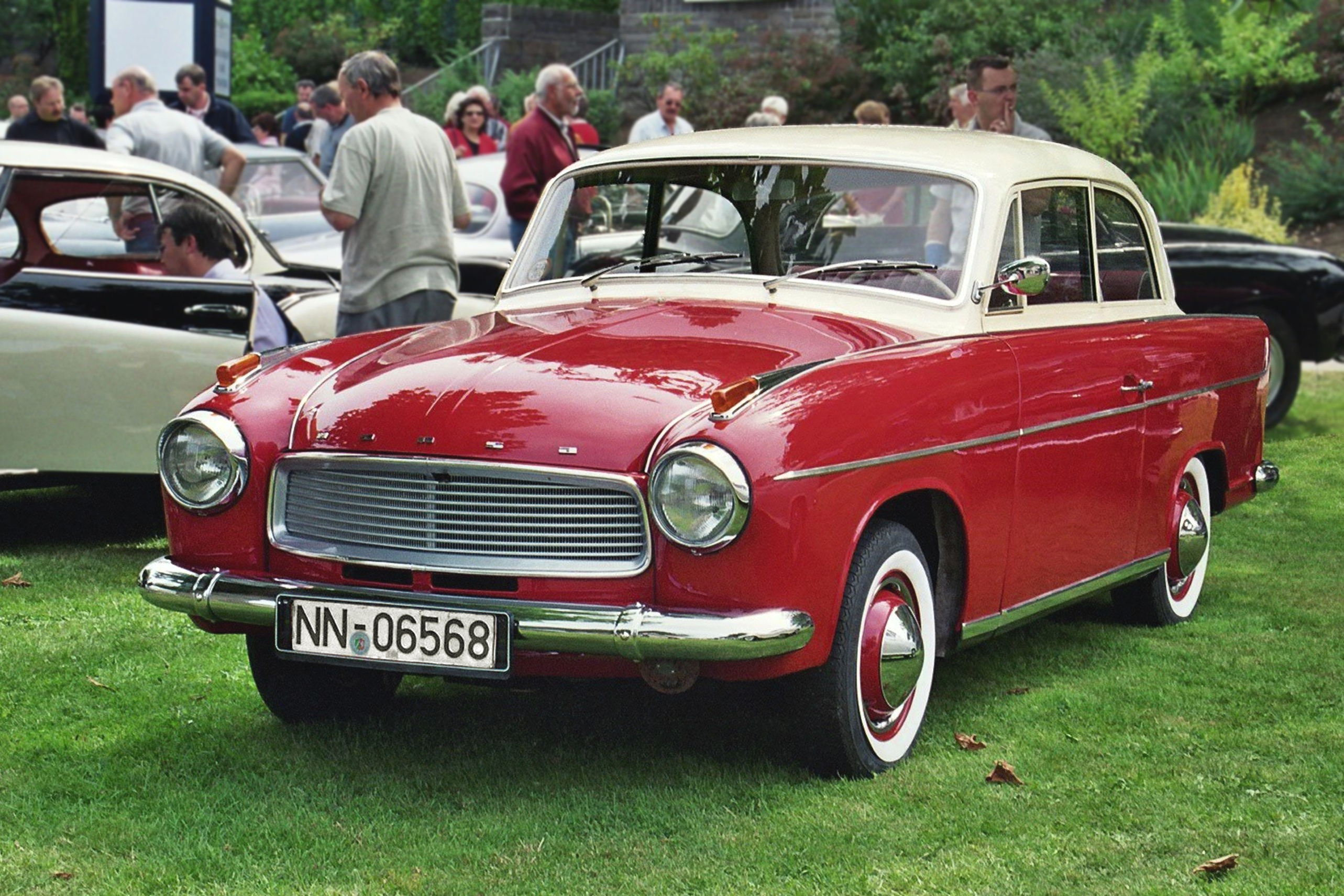 Hansa 1100 Limousine beim Borgwardtreffen in Andernach; Kennzeichen verändert